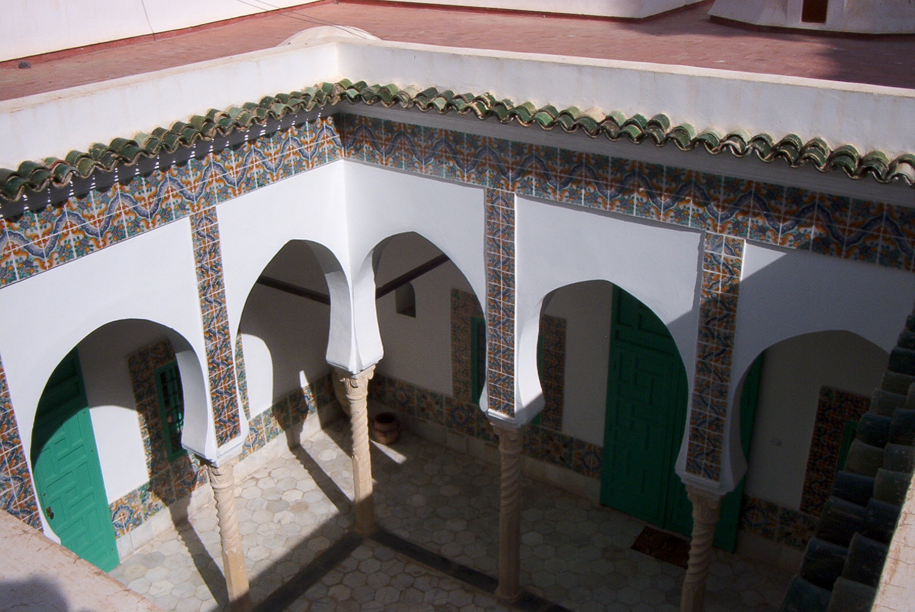 Terrasse et patio à l'étage de la villa Abdeltif